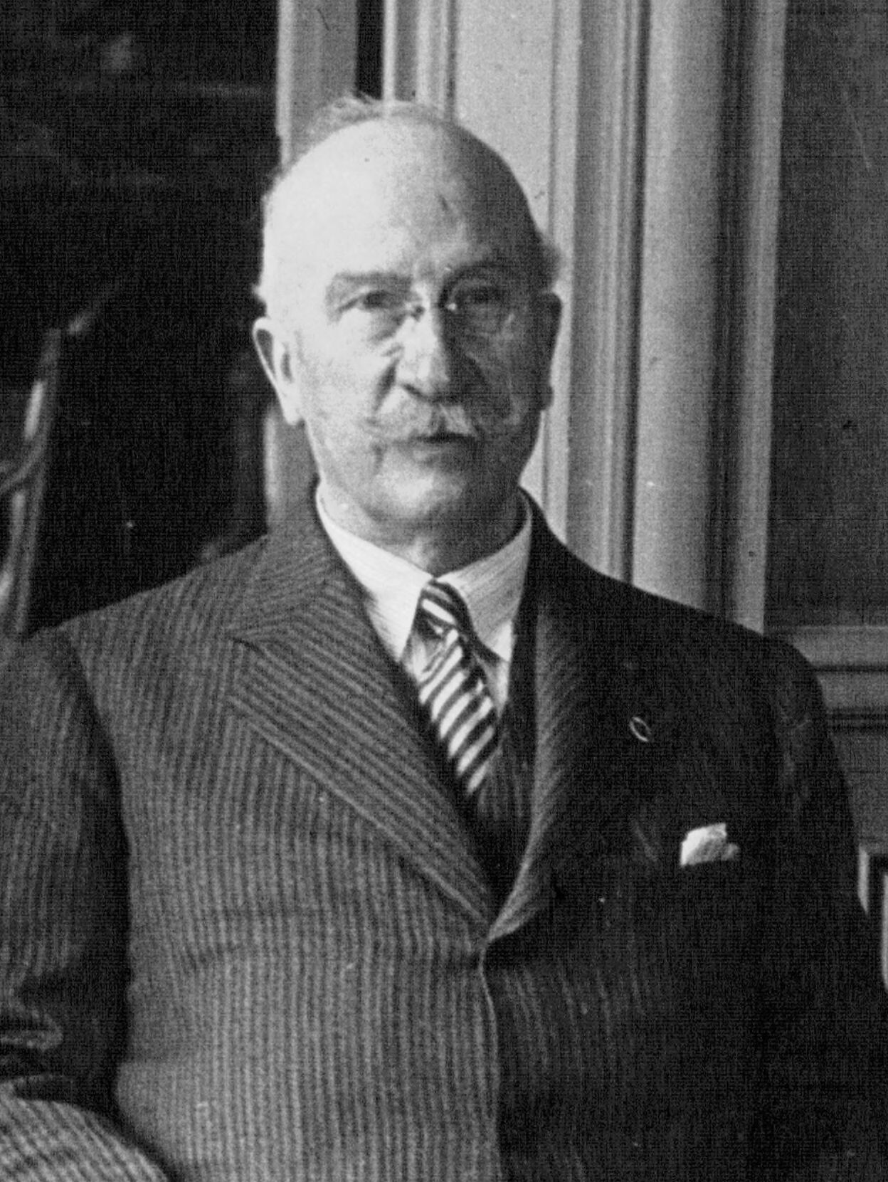 Alejandro Lerroux, político español.